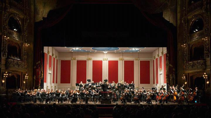 La Orquesta Estable del Teatro Colón se presenta junto a Valery Gergiev en 2013.